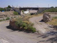 Vestigio medieval de un antiguo acueducto del siglo XVI pero construido en su inicio y base en época medieval.